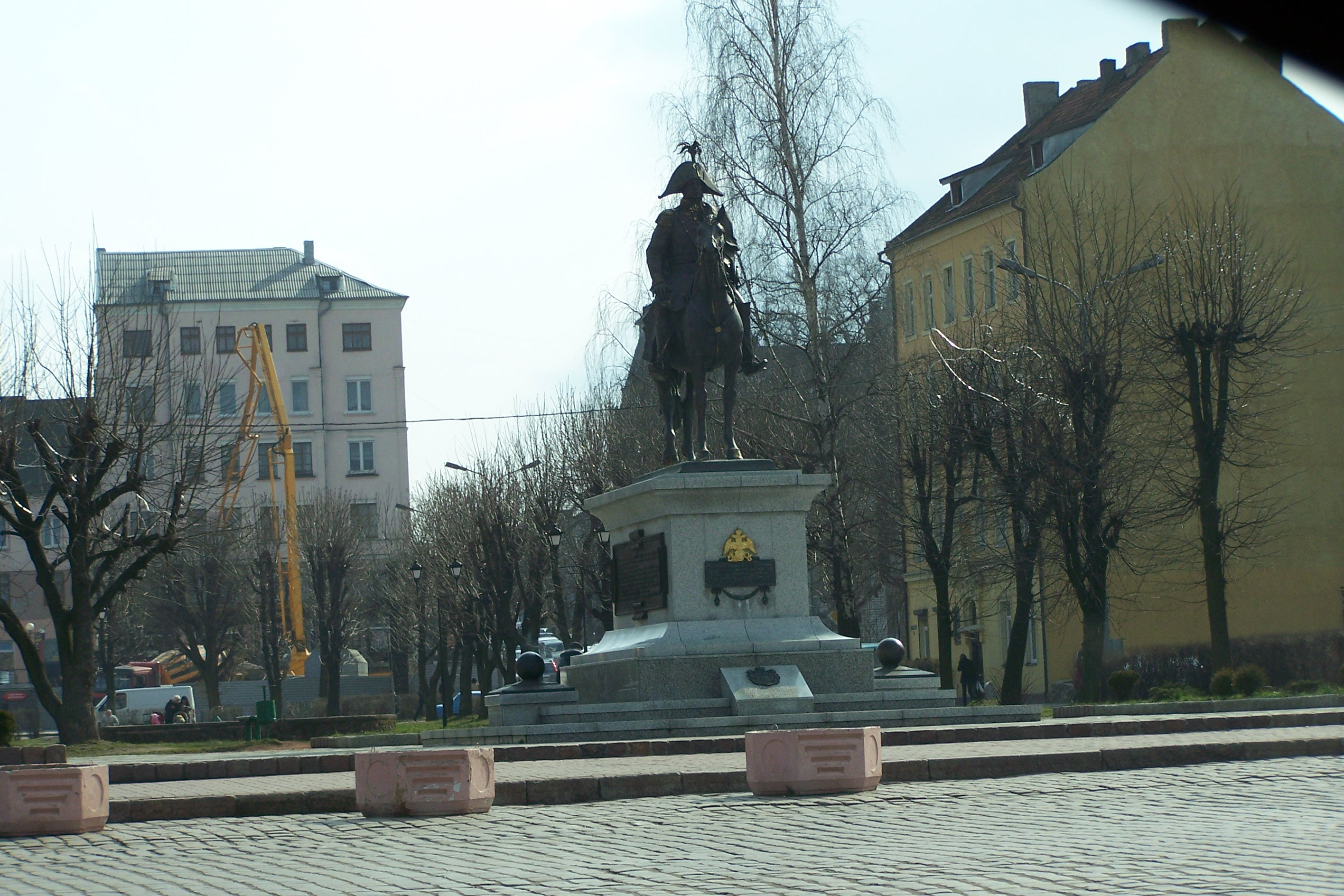 Denkmal für Barclay de Tolly in Tschernjachowsk